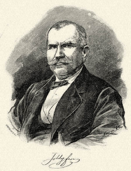 Toldy Ferenc. Morelli Gusztáv fametszete. Megjelent Az Osztrák-Magyar Monarchia írásban és képben (1887–1901) kiadványban